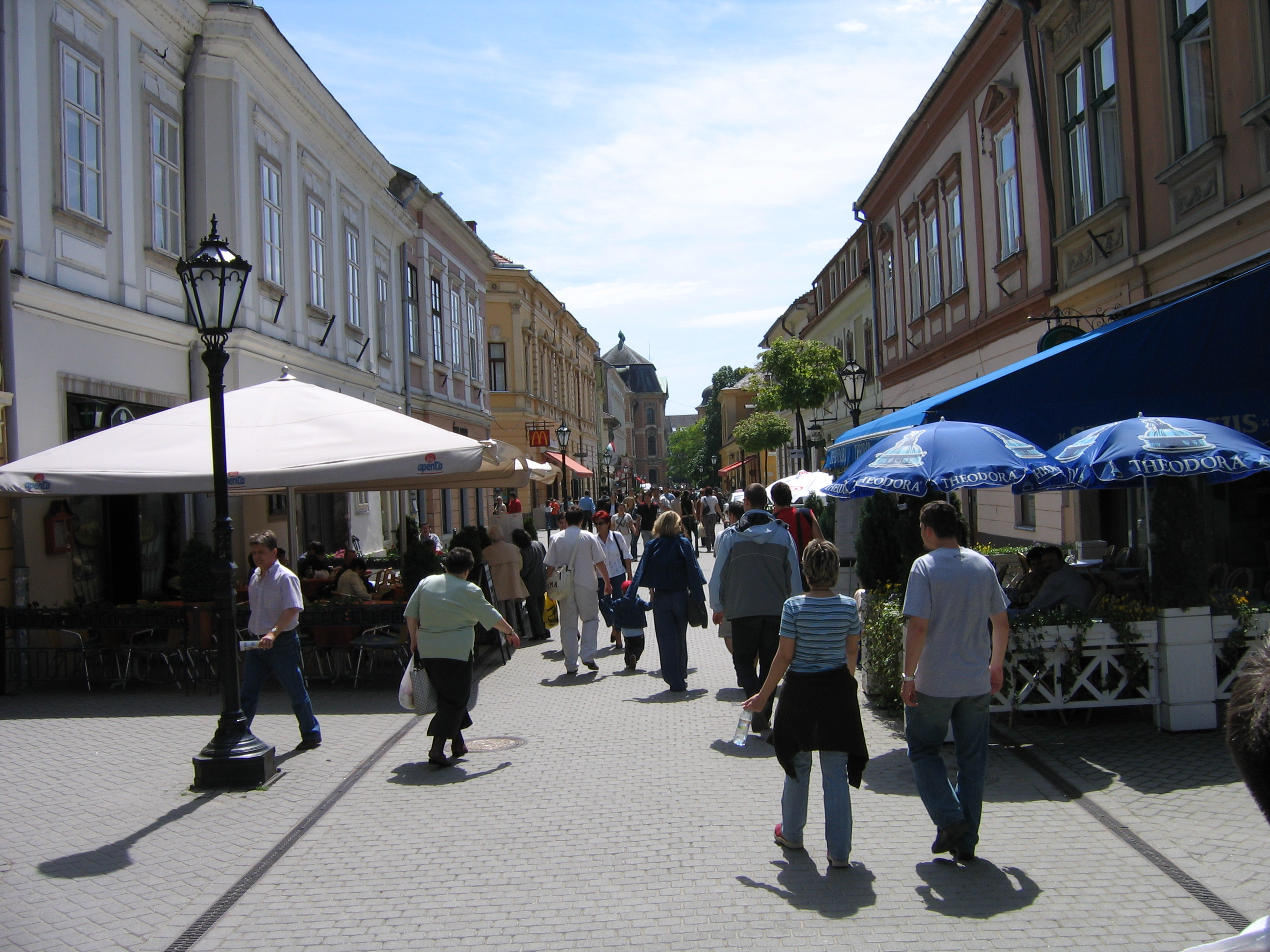 Eger, Hungary